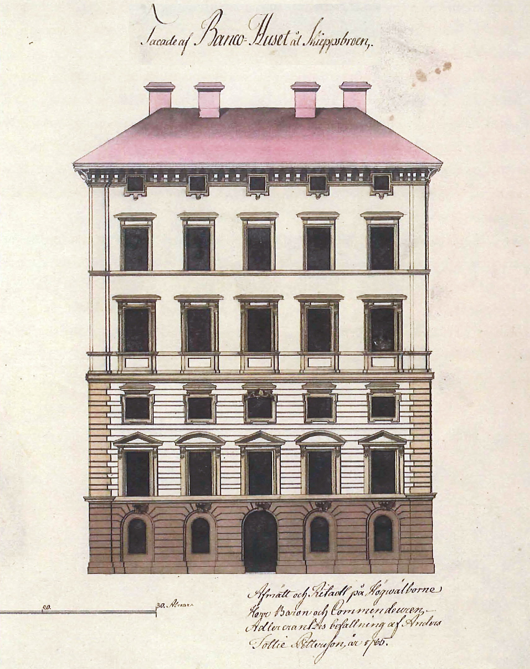 Hårlemans ritningar har inte åte1junnits, men i samband med en ombyggnad 1785 gjordes dessa avritningar av fasaden mot Skeppsbron av Anders Tottie Pettersson på uppdrag av Carl Fredrik Adelcrantz